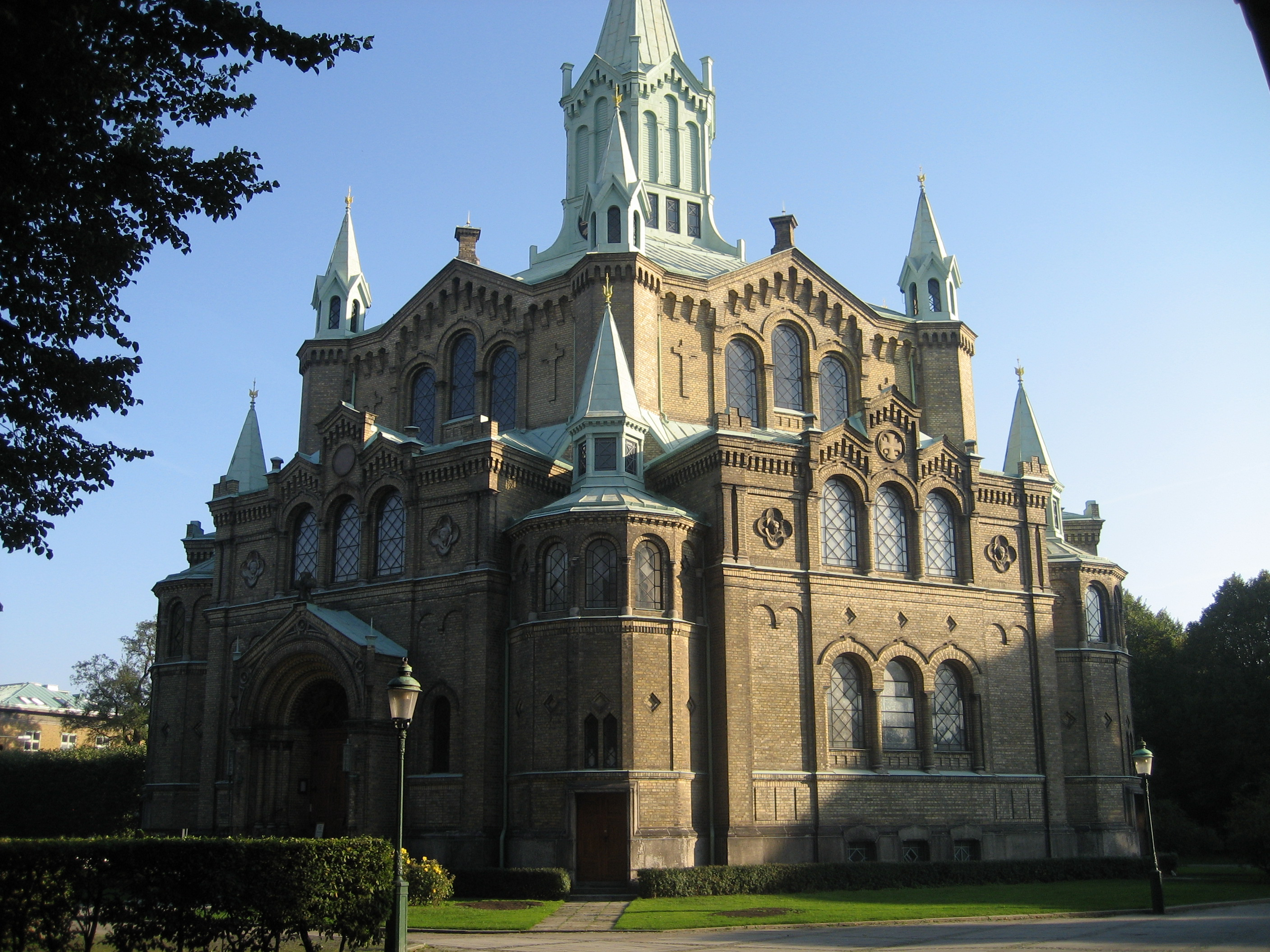 Bild på Sankt Pauli kyrka en bit ifrån